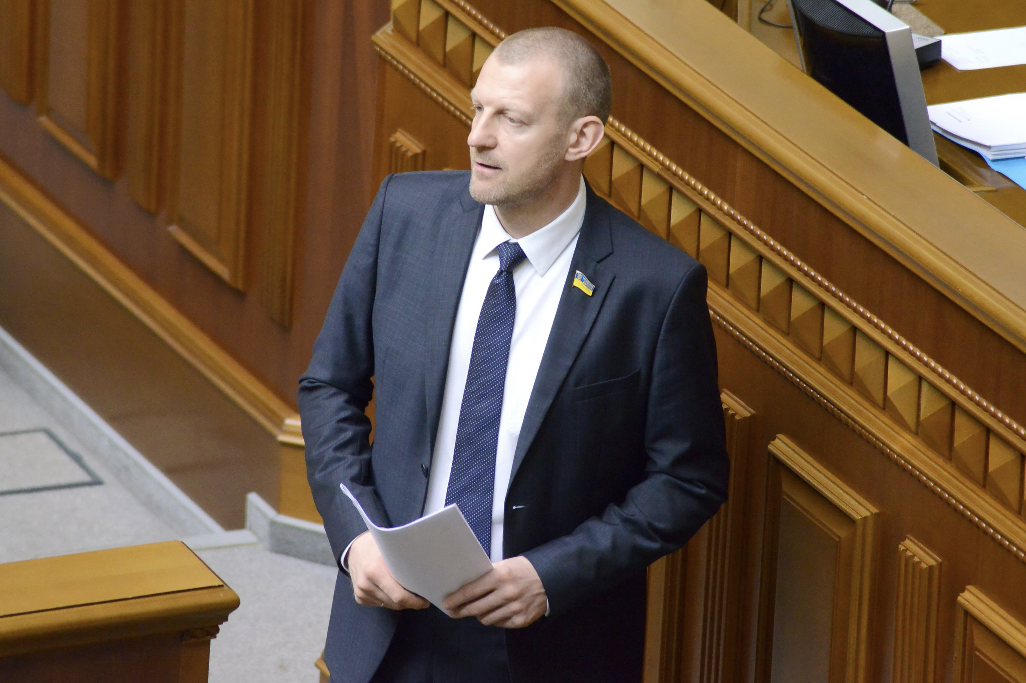 ВЕРХОВНА РАДА УКРАЇНИ 2015 фотограф Вадим Чуприна